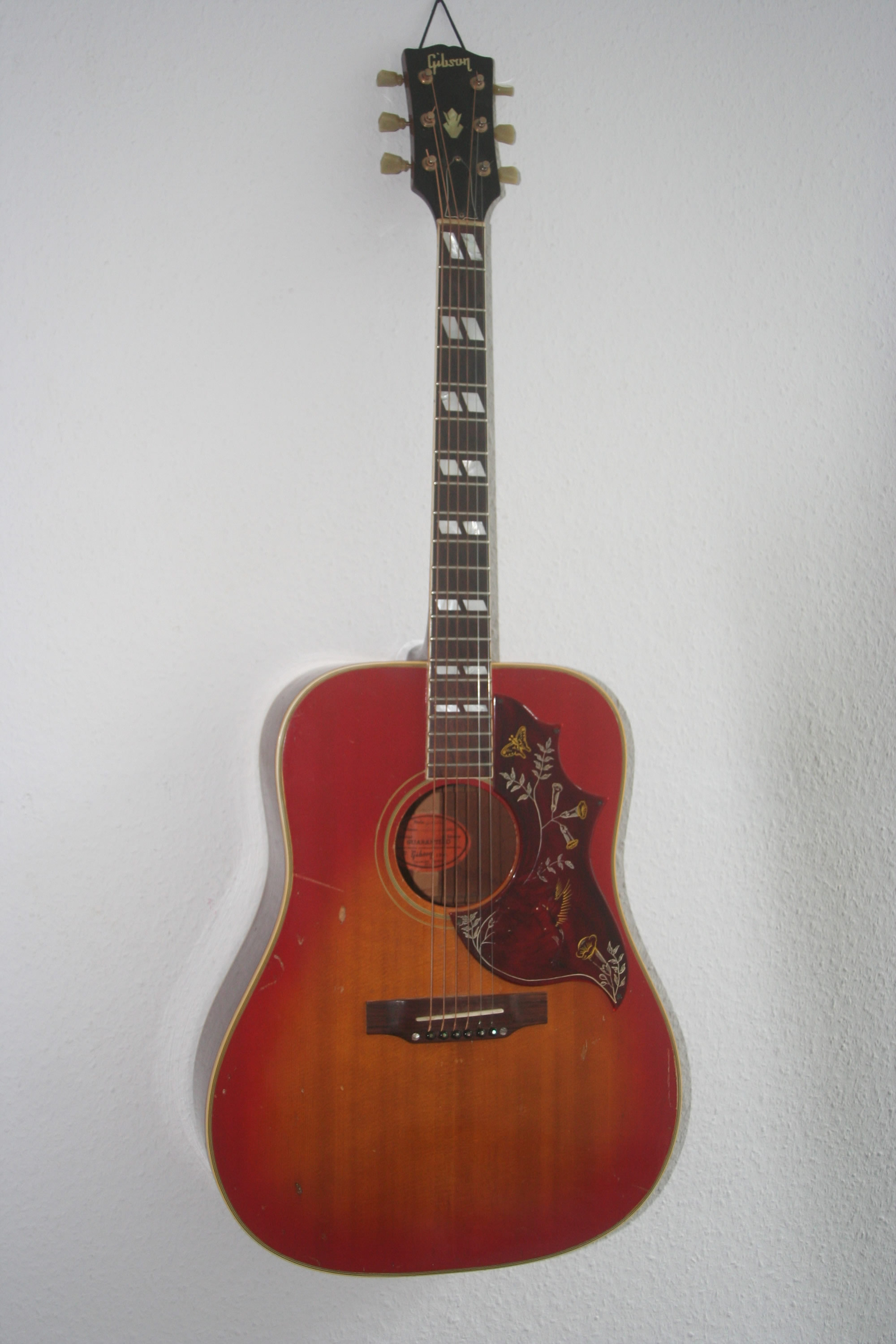 Gibson Hummingbird 1968